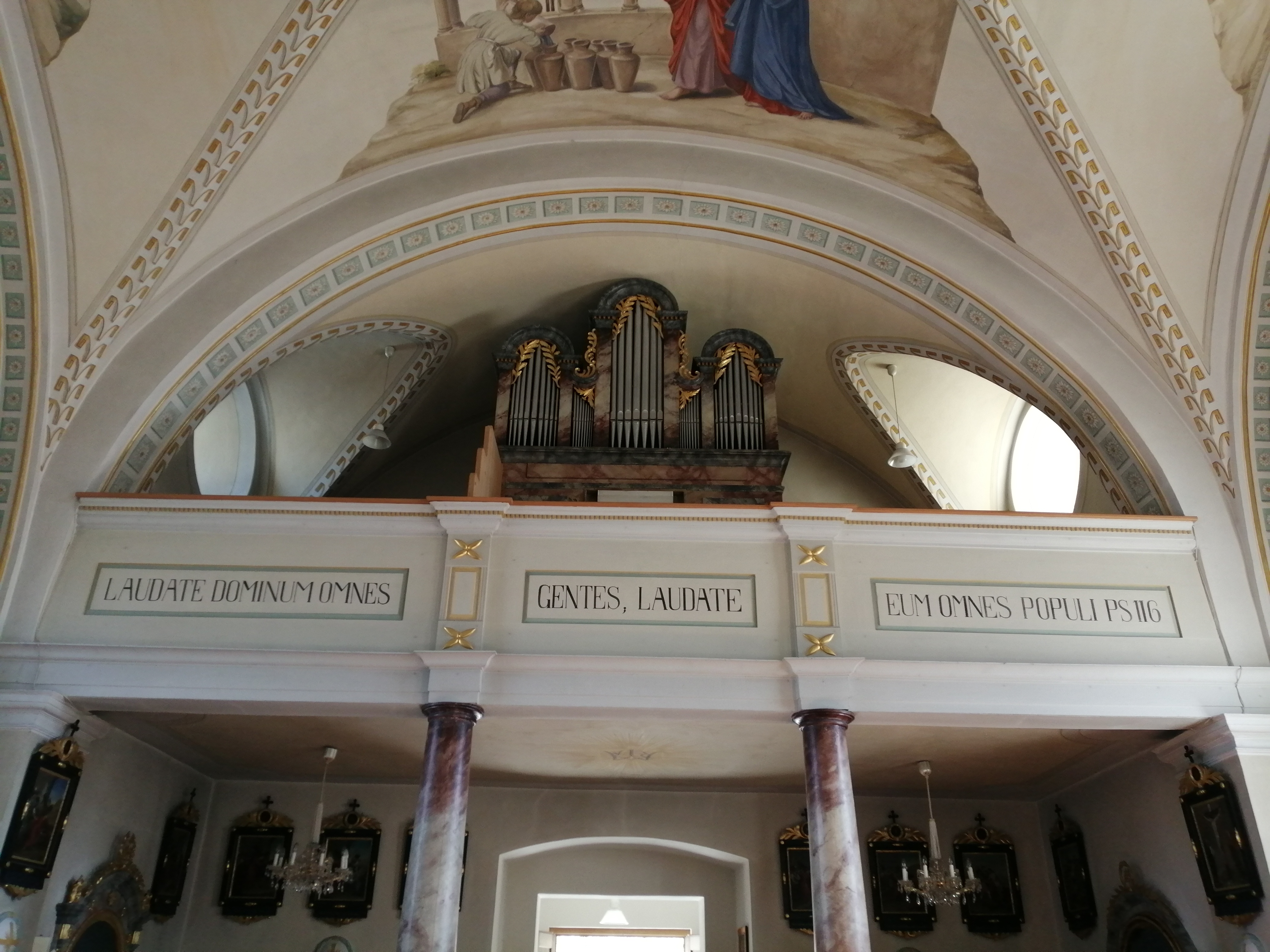 Expositurkirche Haimingerberg - Innenansicht gegen Empore